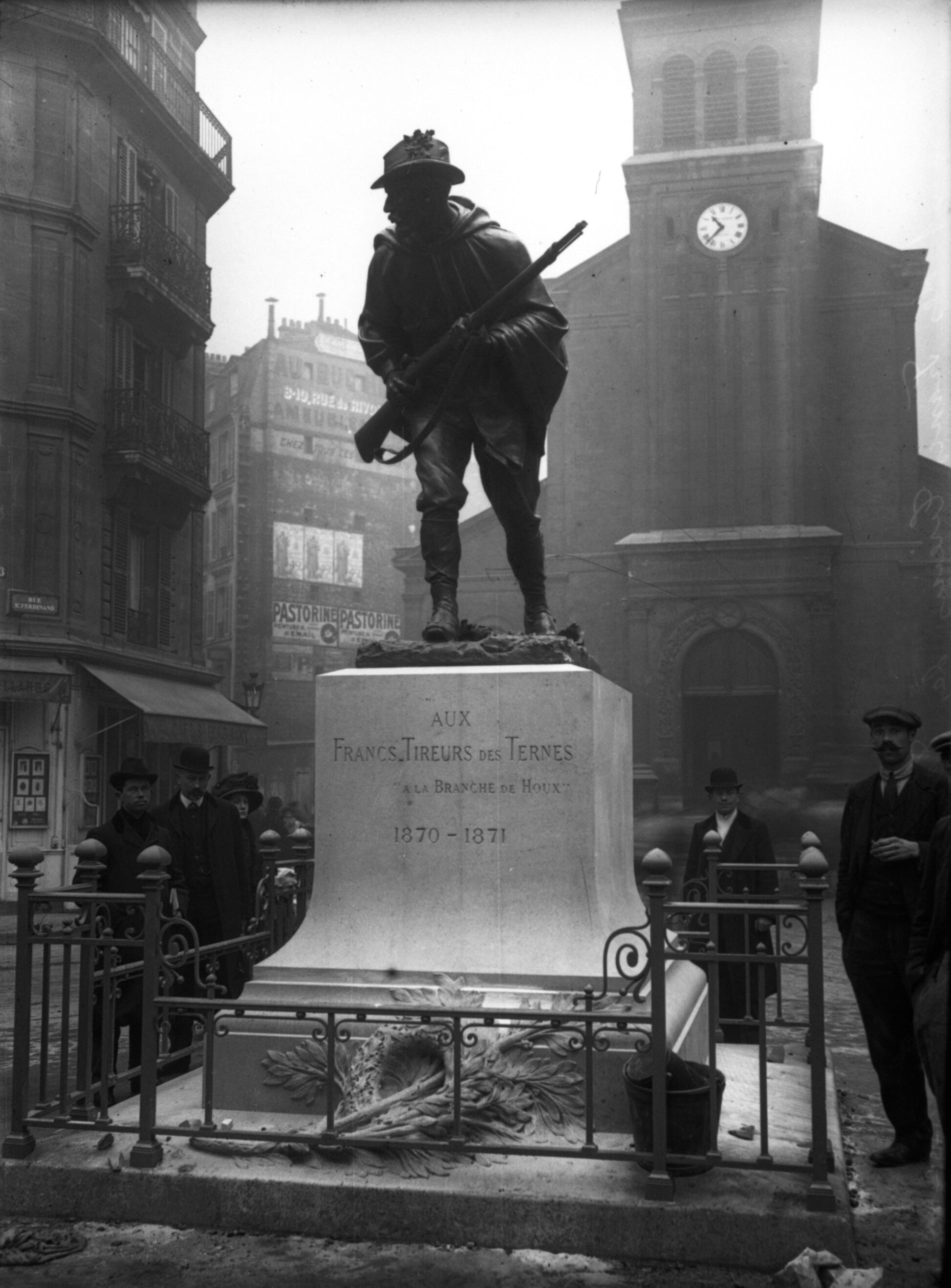 Monument des francs-tireurs des Ternes, 29 janvier 1911 : [photographie de presse] / [Agence Rol] aujourd'hui disparu , place Tristan Bernard Paris 17è devant l'ancienne église de Saint Ferdinand des Ternes Titre : Monument des francs-tireurs des Ternes, 29 janvier 1911 : [photographie de presse] / [Agence Rol] Auteur : Agence Rol. Agence photographique Date d'édition : 1911 Sujet : Monuments commémoratifs militaires -- France -- Paris (France) Sujet : Guerre franco-allemande (1870-1871) Sujet : Paris (France) -- Arrondissement (17e) Sujet : Paris (France) -- Place Saint-Ferdinand Type : image fixe,photographie Langue : Français Format : 1 photogr. nég. sur verre ; 13 x 18 cm (sup.) Format : image/jpeg Droits : domaine public Identifiant : ark:/12148/btv1b6915174b Source : Bibliothèque nationale de France, département Estampes et photographie, EST EI-13 (76) Relation : Description : Référence bibliographique : Rol, 12454 Provenance : bnf.fr